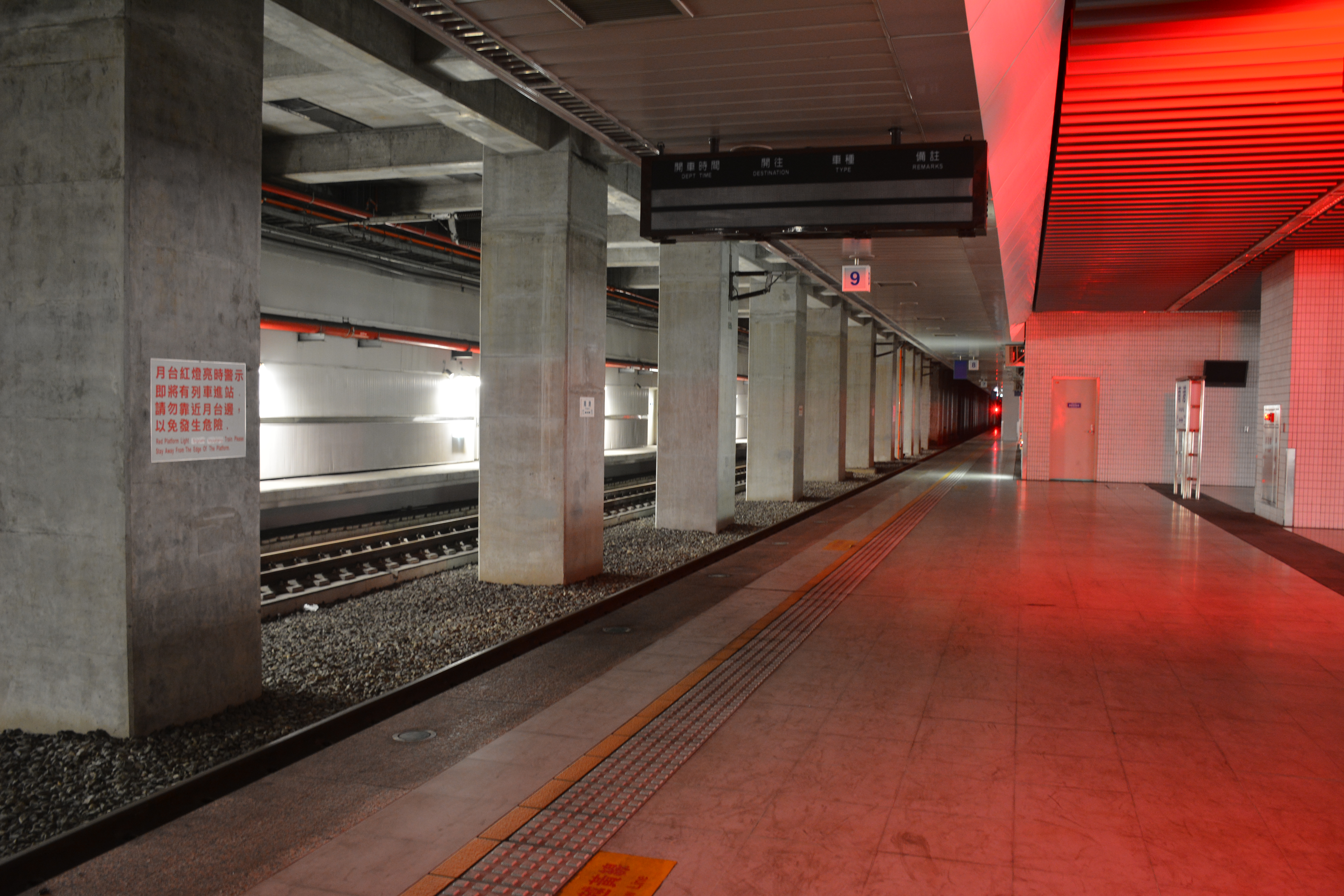 中文（台灣）: 臺灣鐵路管理局南港車站第三月台，平常不使用。